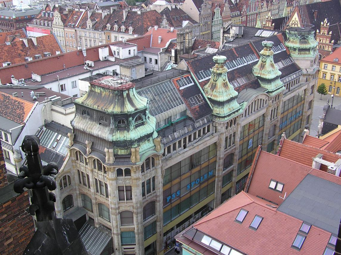 Dawny dom handlowy braci Barasch, dziś DH Feniks